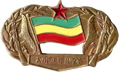 no original description